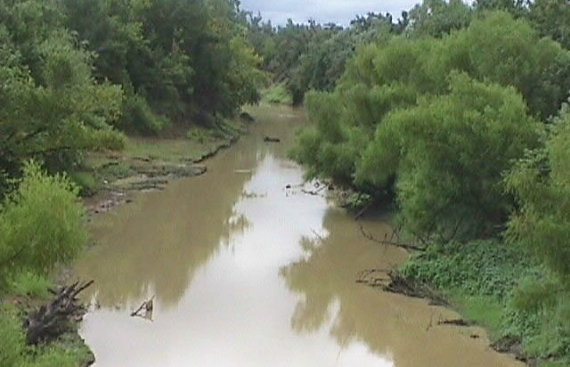 The Poteau River near Panama, Oklahoma